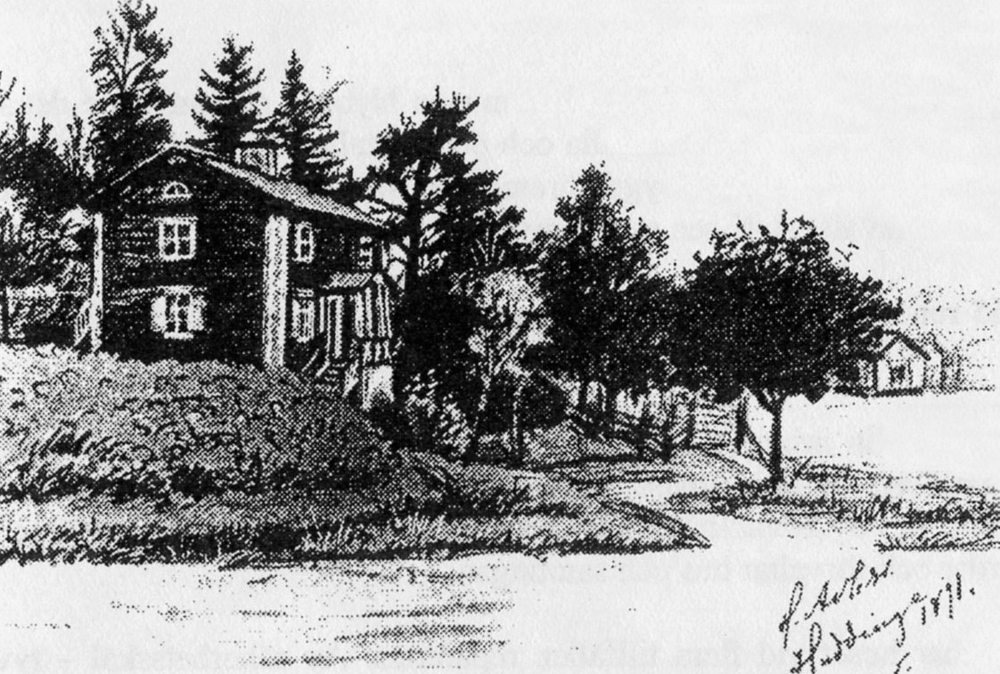 Nyboda (Klockargården) 1891